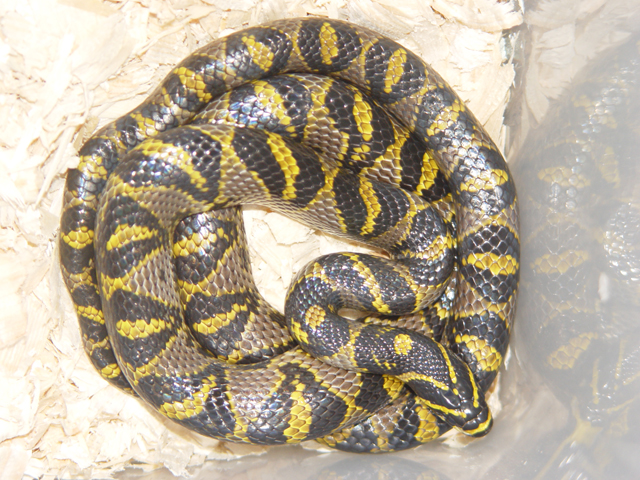 Picture of Elaphe Mandarina